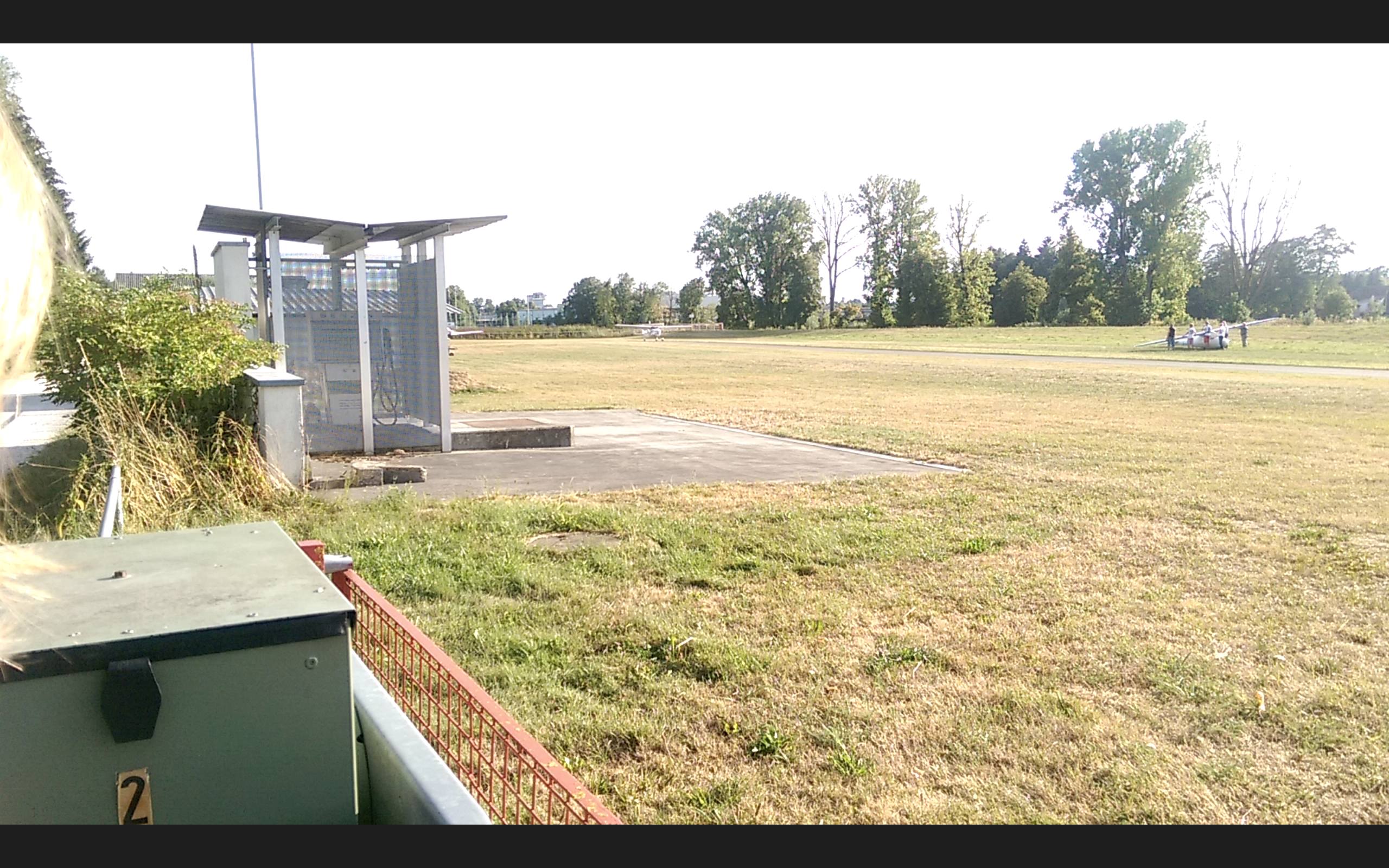 Tankstelle des Flugplatzes mit einer startenden Skyhawk